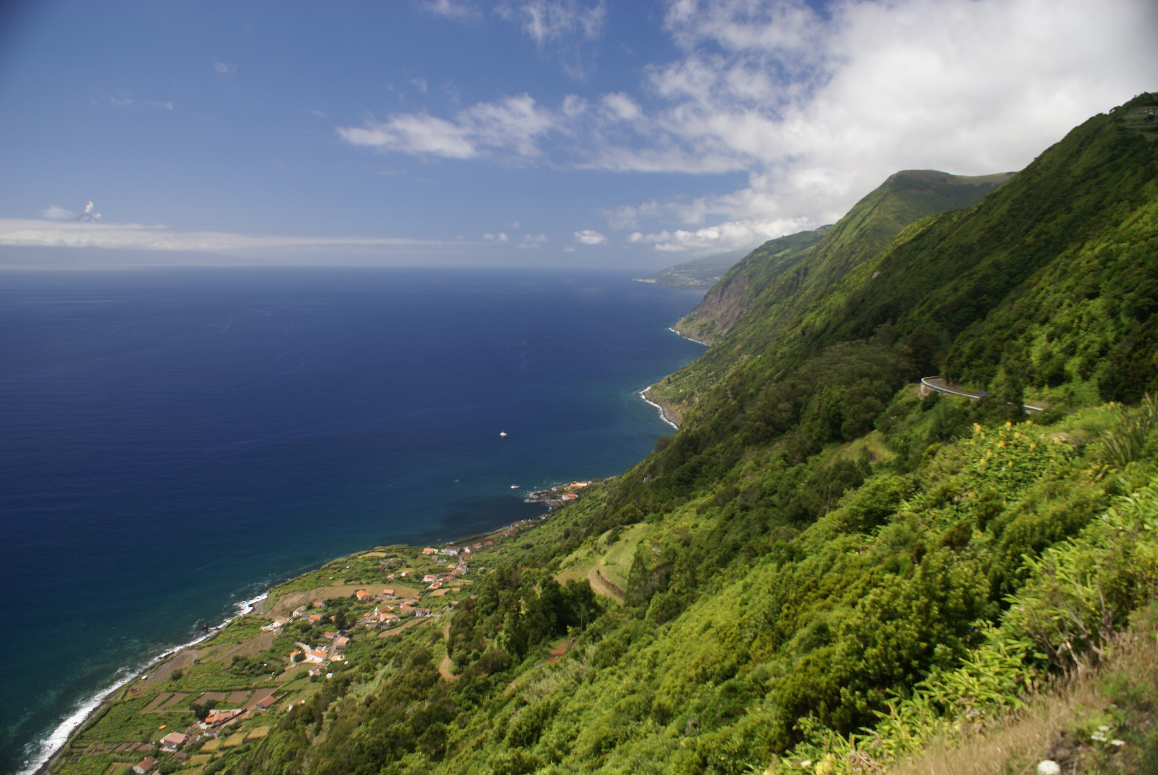 Fajã de São João, falésias e caminho para a fajã, Calheta, ilha de São Jorge, Açores